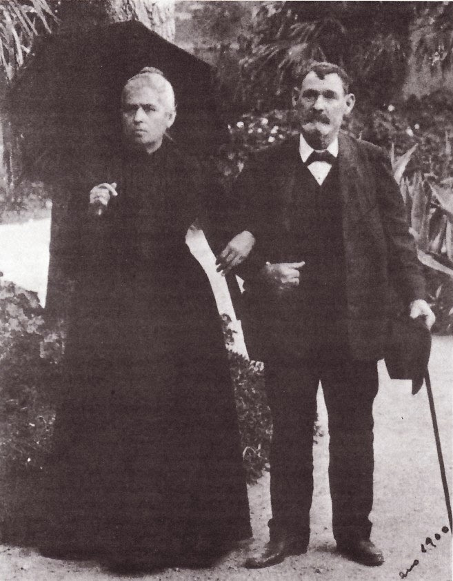 Miguel Zapata y su mujer en 1900